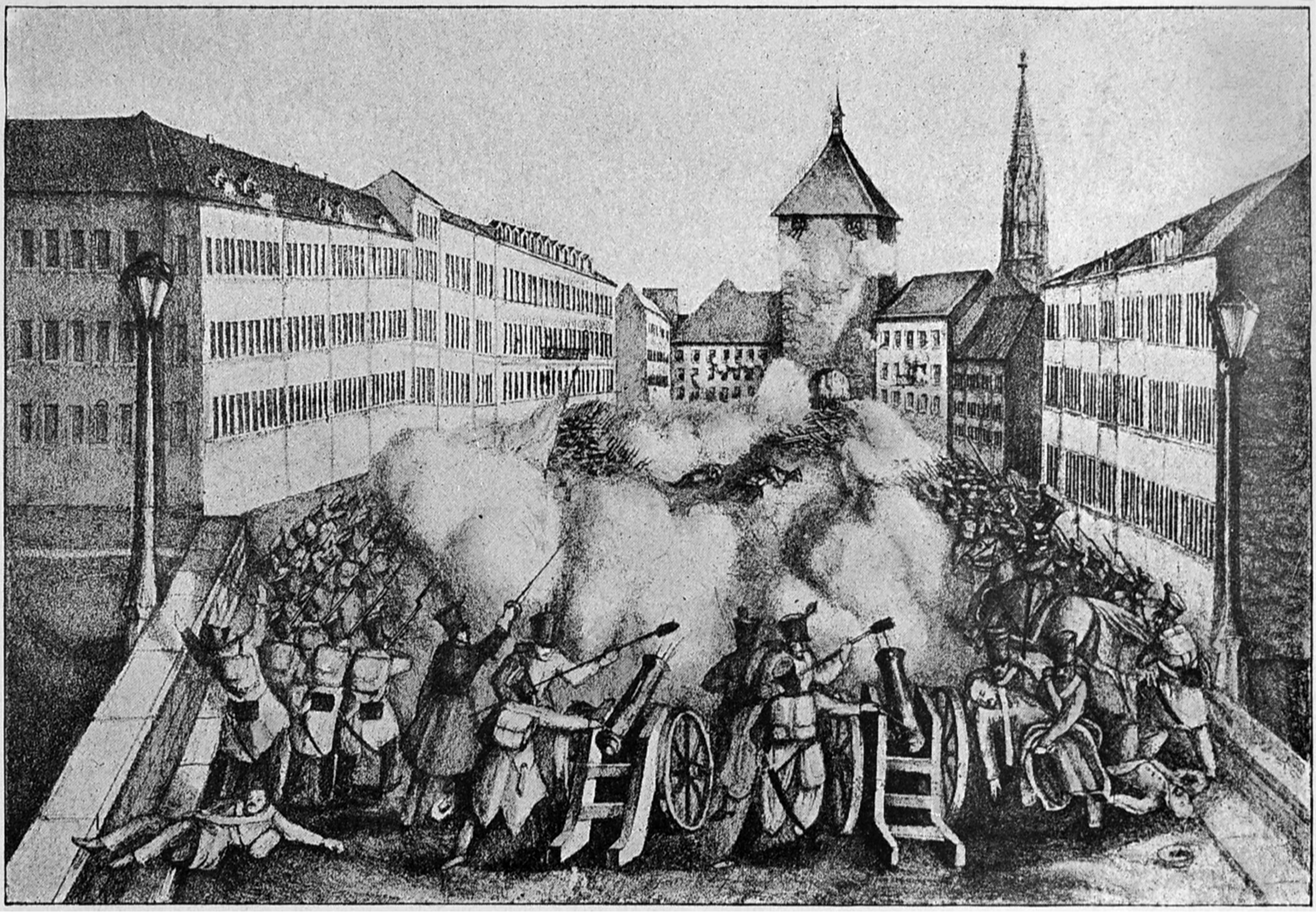 Freiburg im Jahre 1848